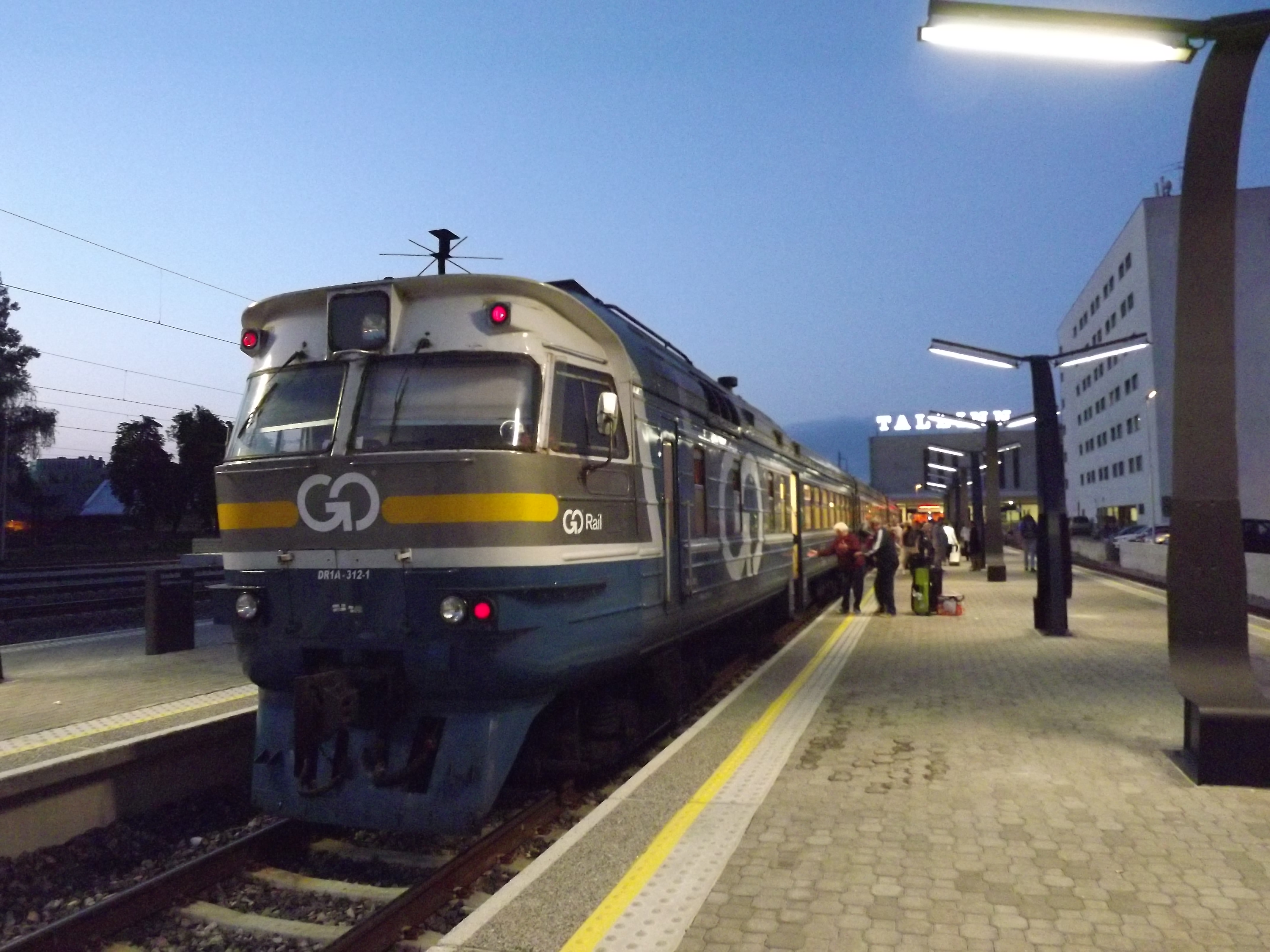 GO raily diiselrong Balti jaamas